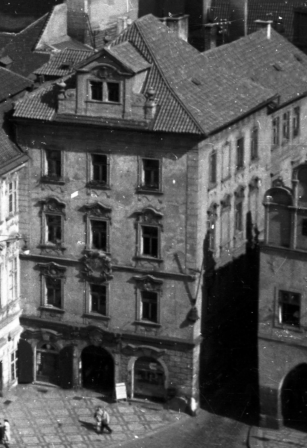 Óváros tér (Staromestske namesti) az Óratoronyból a Goltz-Kinsky palota felé nézve. Location: Czech Republik, Prague Tags: picture, Czechoslovakia Title: Óváros tér (Staromestske namesti) az Óratoronyból a Goltz-Kinsky palota felé nézve.